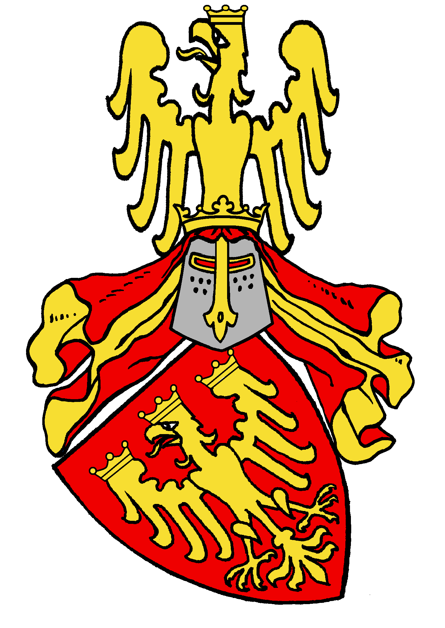 Wappen des alten ostfriesischen Häuptlingsgeschlechts tom Brook